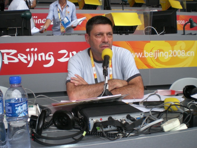 2008 קמי ברץ משדר מהמשחקים האולימפיים בביג'ינג